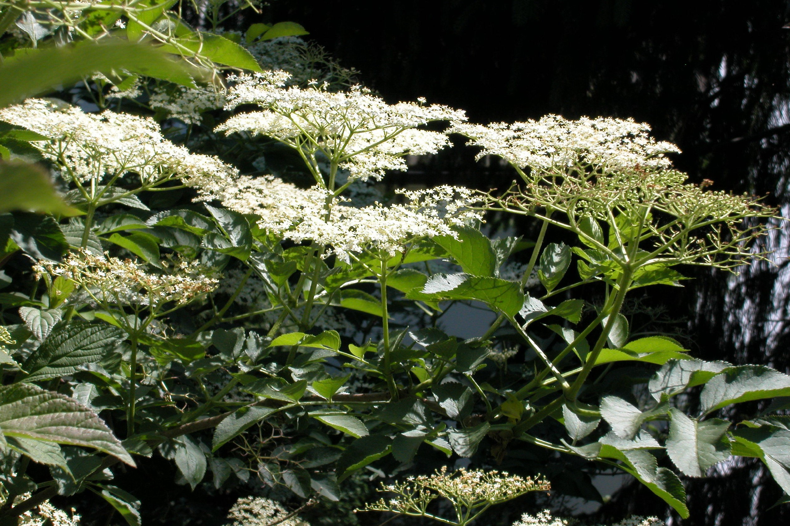 Holunderblüte